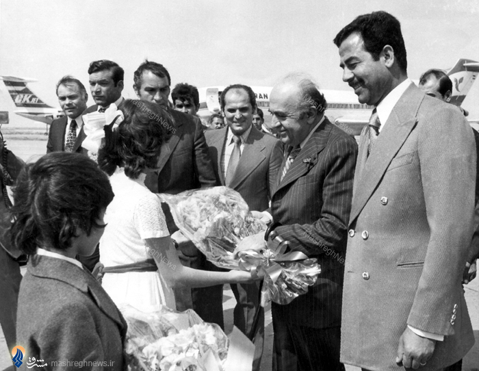 امیرعباس هویدا پس از بستن ۱۹۷۵ الجزایر به دعوا صدام حسین به عراق سفر کرد.